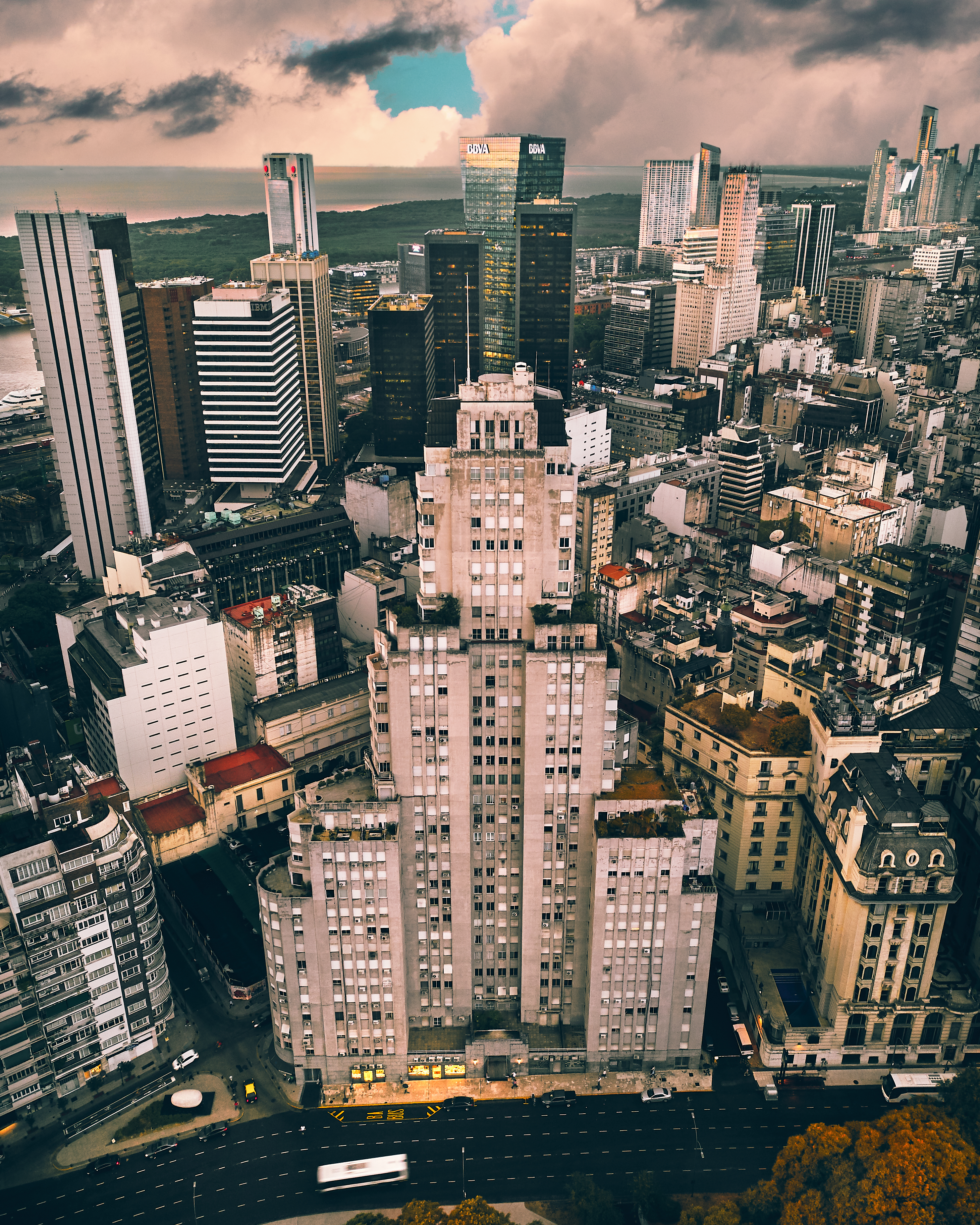 Edificio Kavanagh, Buenos Aires